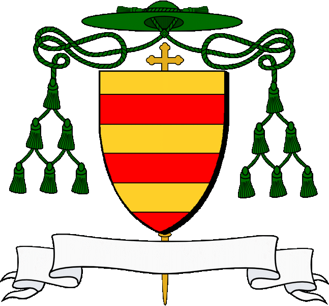 Treustellet a c'hwec'h pezh etre aour ha gwad